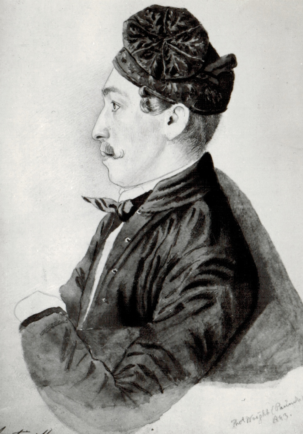 Николай Соломонович Мартынов, убийца М.Ю.Лермонтова